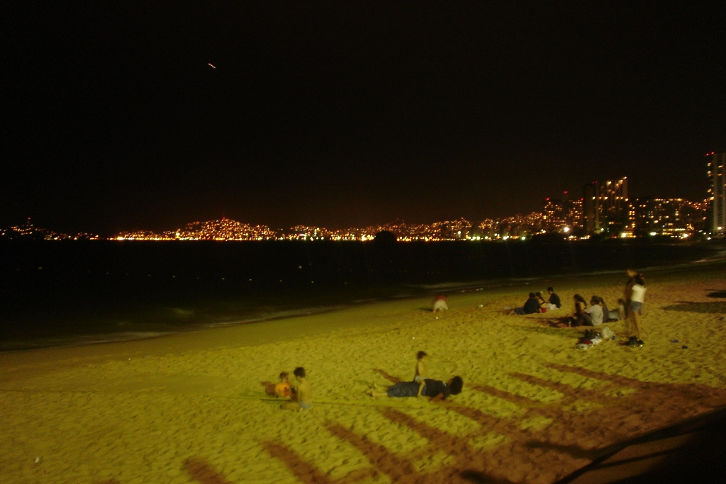 Panorama nocturno de Playa Icacos en Acapulco, México.